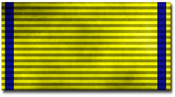 Ruotsin Miekkaritarikunnan nauha.